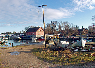 Norsminde Saksild Sogn, Hads Herred, Århus Amt, Denmark